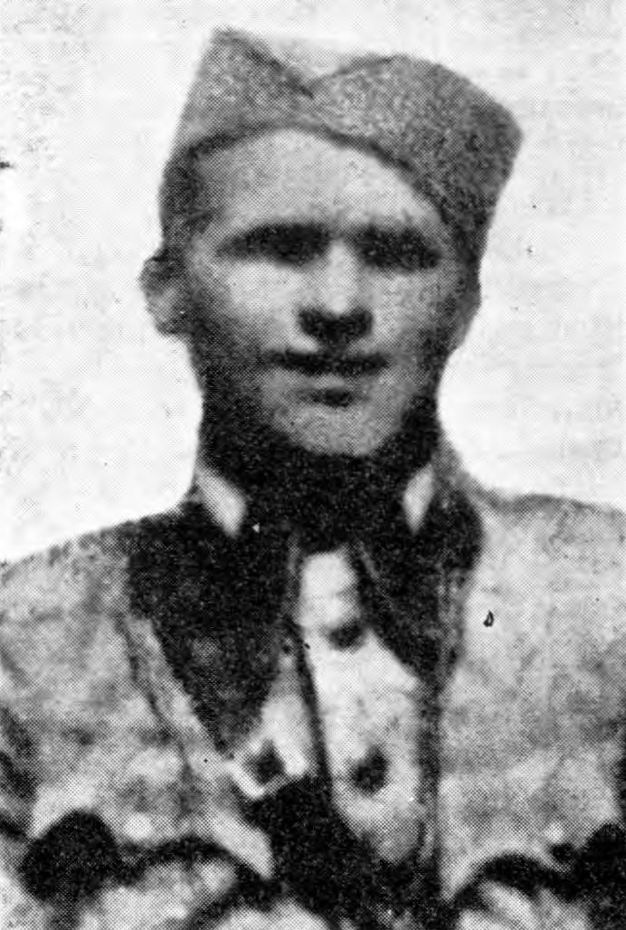 Valentin Zevnik-Viktor Železnik (1914-1943)